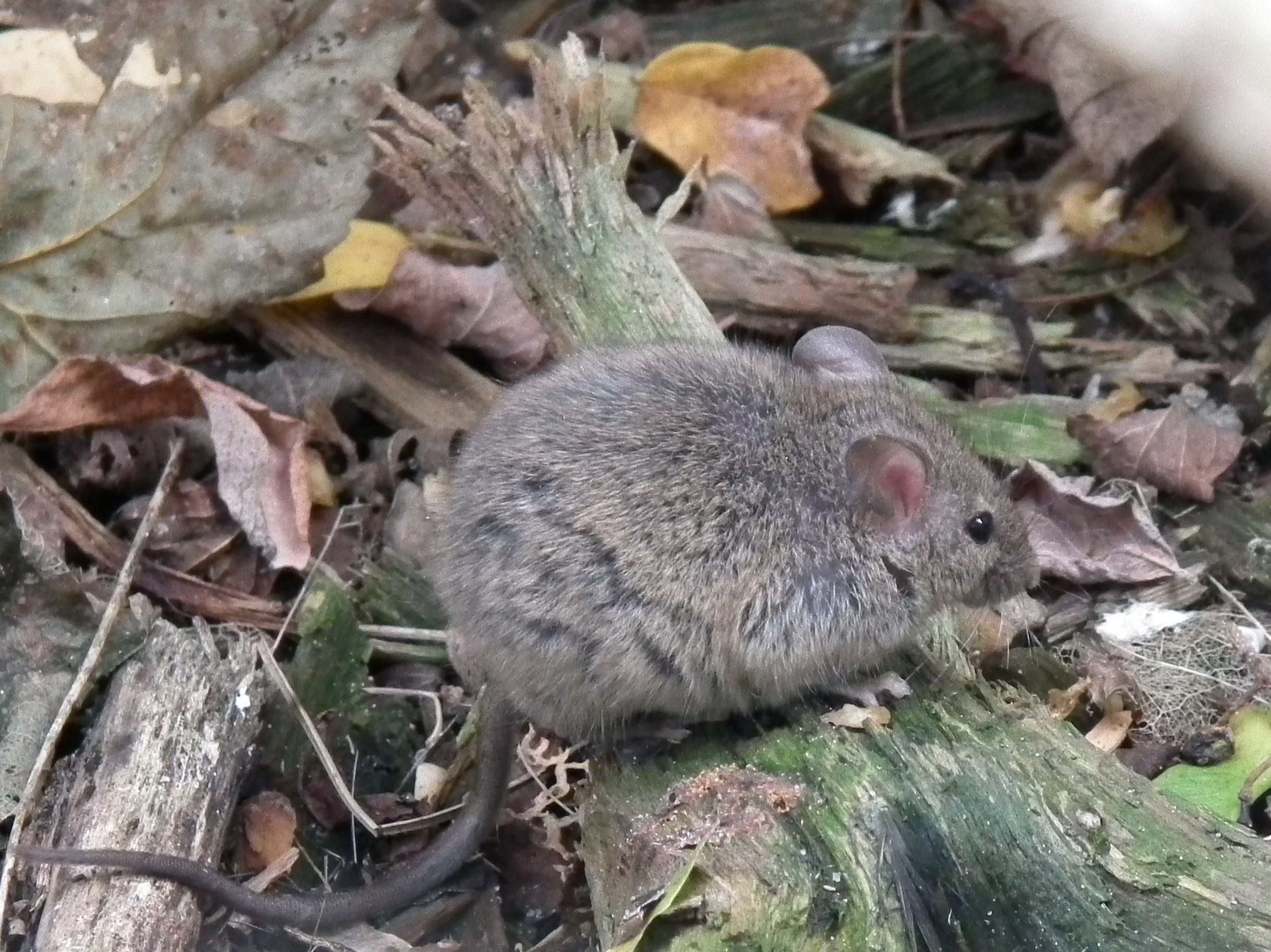 Hausmaus (Mus musculus), fotografiert in Südhessen (Deutschland)